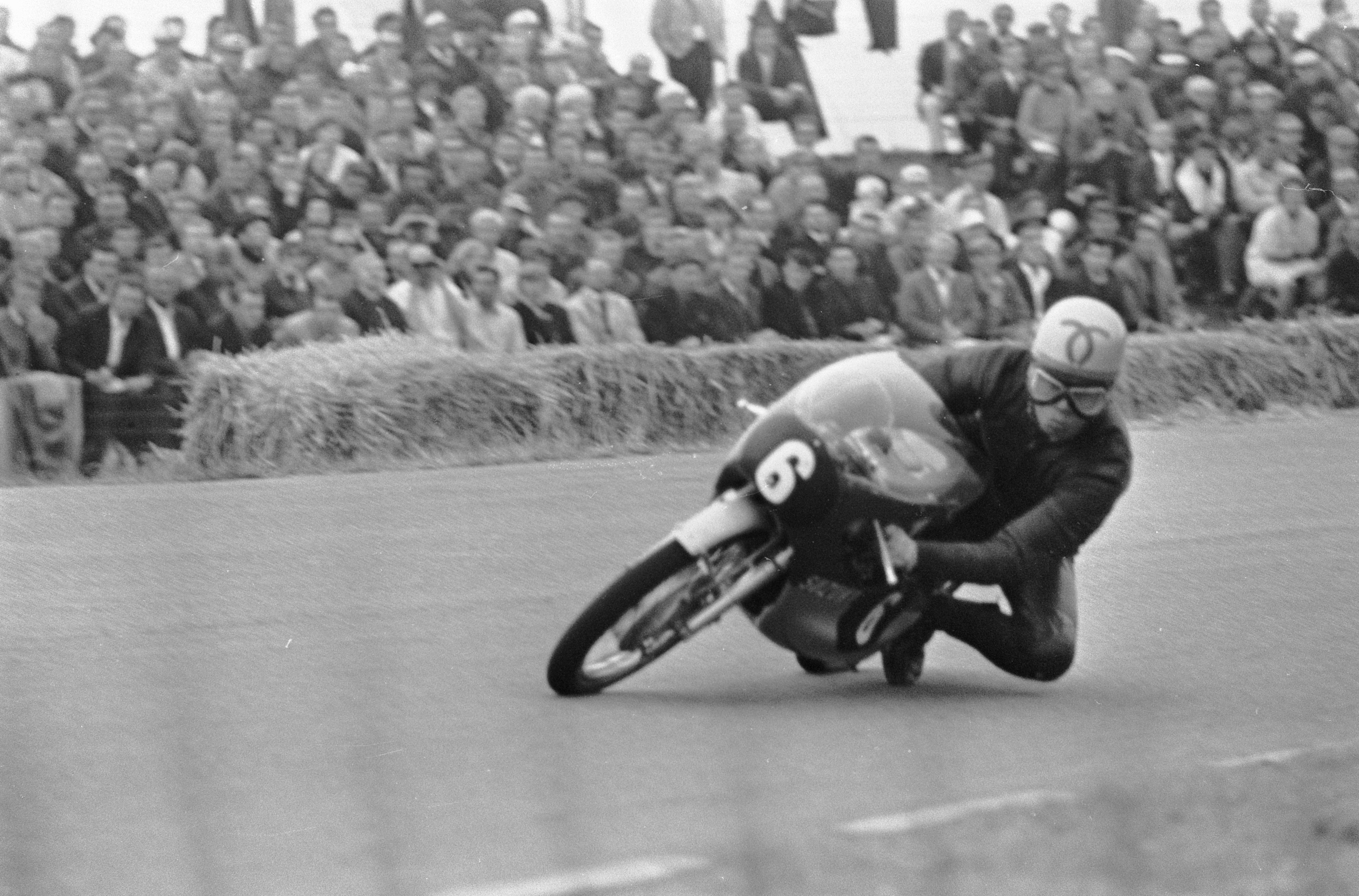 Collectie / Archief : Fotocollectie Anefo Reportage / Serie : TT Assen 1967 Beschrijving : 125 cc-klasse, Yoshimi Katayama (Suzuki) Datum : 24 juni 1967 Locatie : Assen, Drenthe Trefwoorden : motorsport Persoonsnaam : Katayama, Yoshimi Fotograaf : Fotograaf Onbekend / Anefo Auteursrechthebbende : Nationaal Archief Materiaalsoort : Negatief (zwart/wit) Nummer archiefinventaris : bekijk toegang 2.24.01.05 Bestanddeelnummer : 920-4320